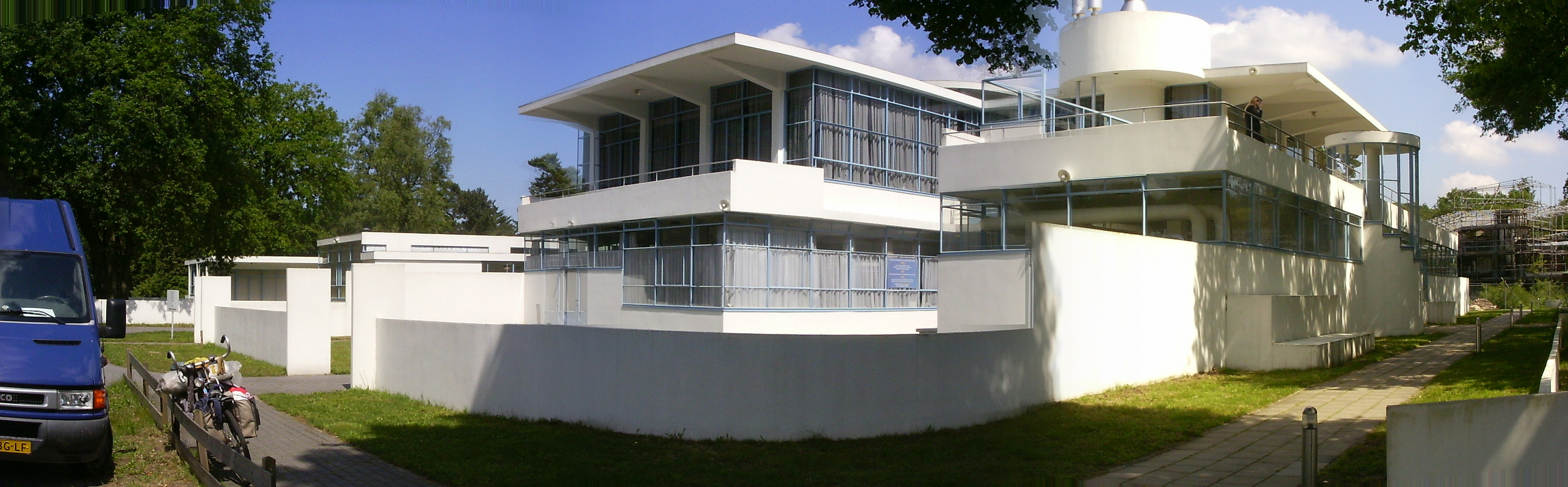 Hoofdgebouw Sanatorium Zonnestraal, achterkant